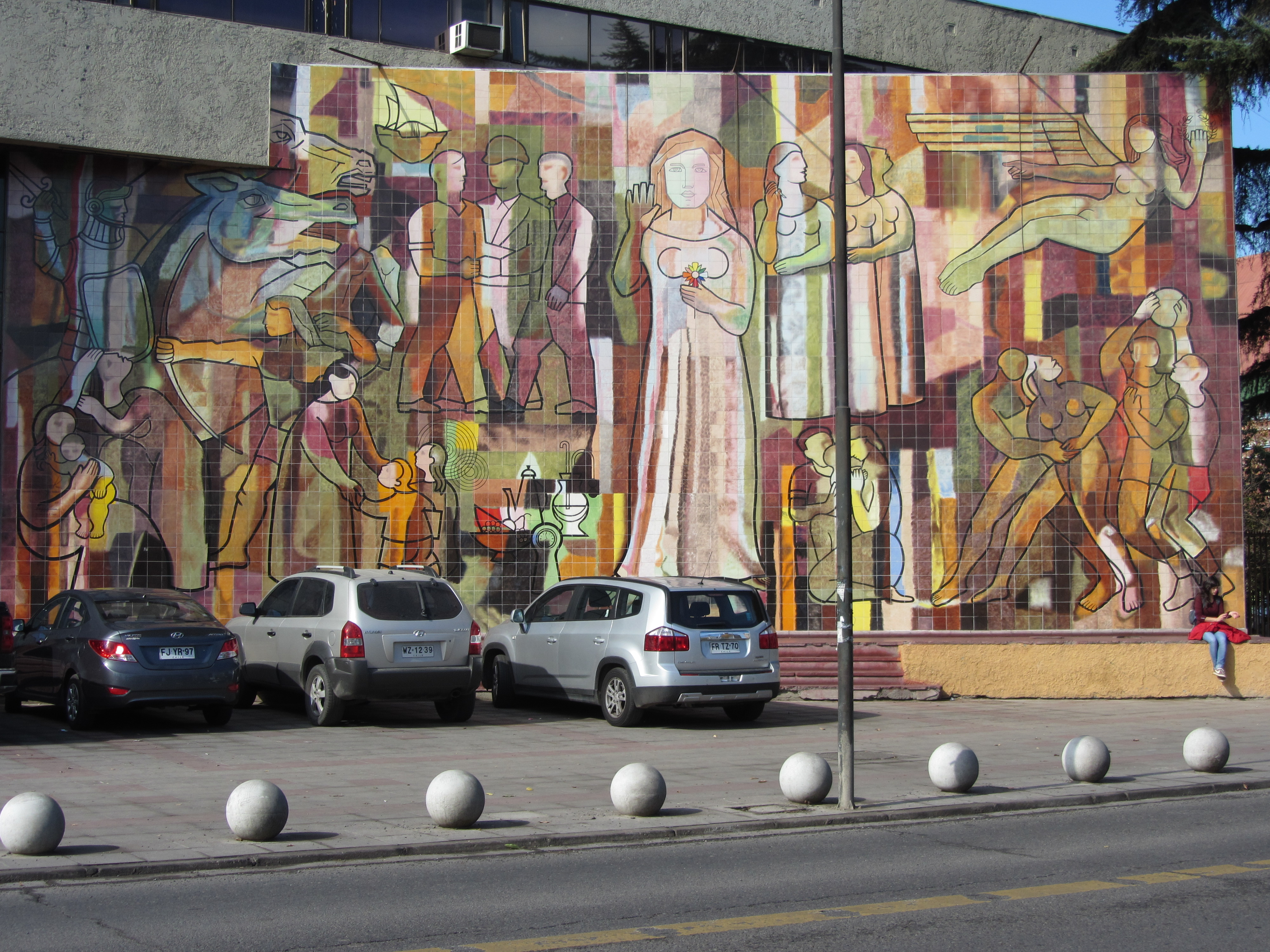 Mural Encuentro, del escultor y muralista chileno Fernando Marcos Miranda